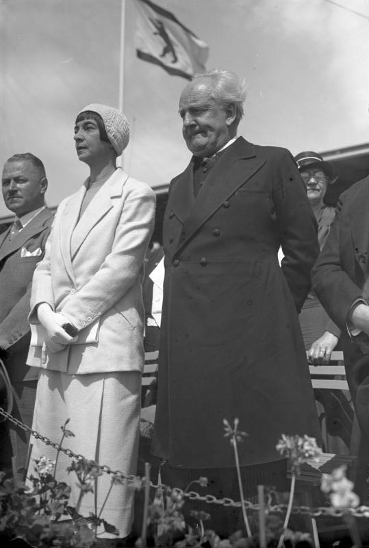 Der berühmte deutsche Dichter Gerhart Hauptmann, feiert am 15. November seinen 70. Geburtstag ! Der bedeutendste deutsche Dramatiker der Gegenwart Gerhart Hauptmann, mit seiner Gattin Margarete Hauptmann.